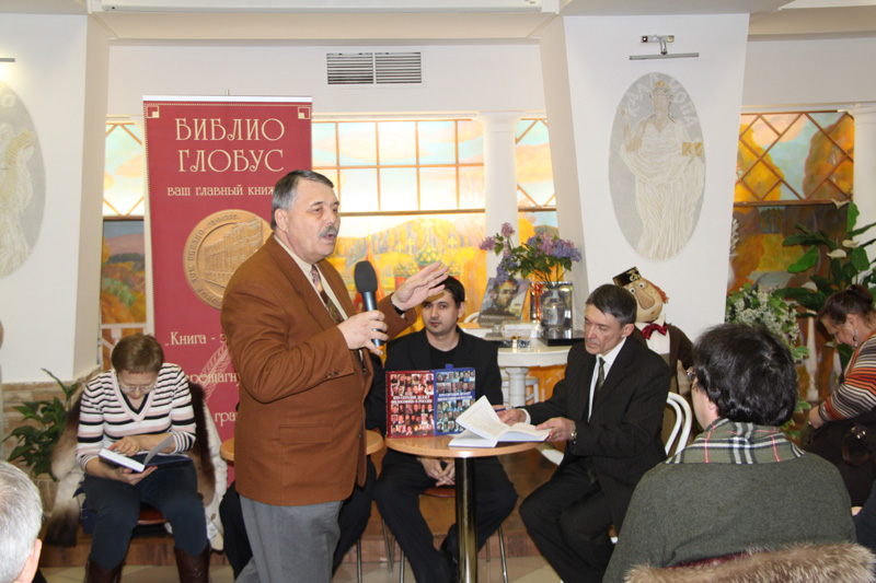 Торговый Дом "Библио-Глобус", Философский клуб